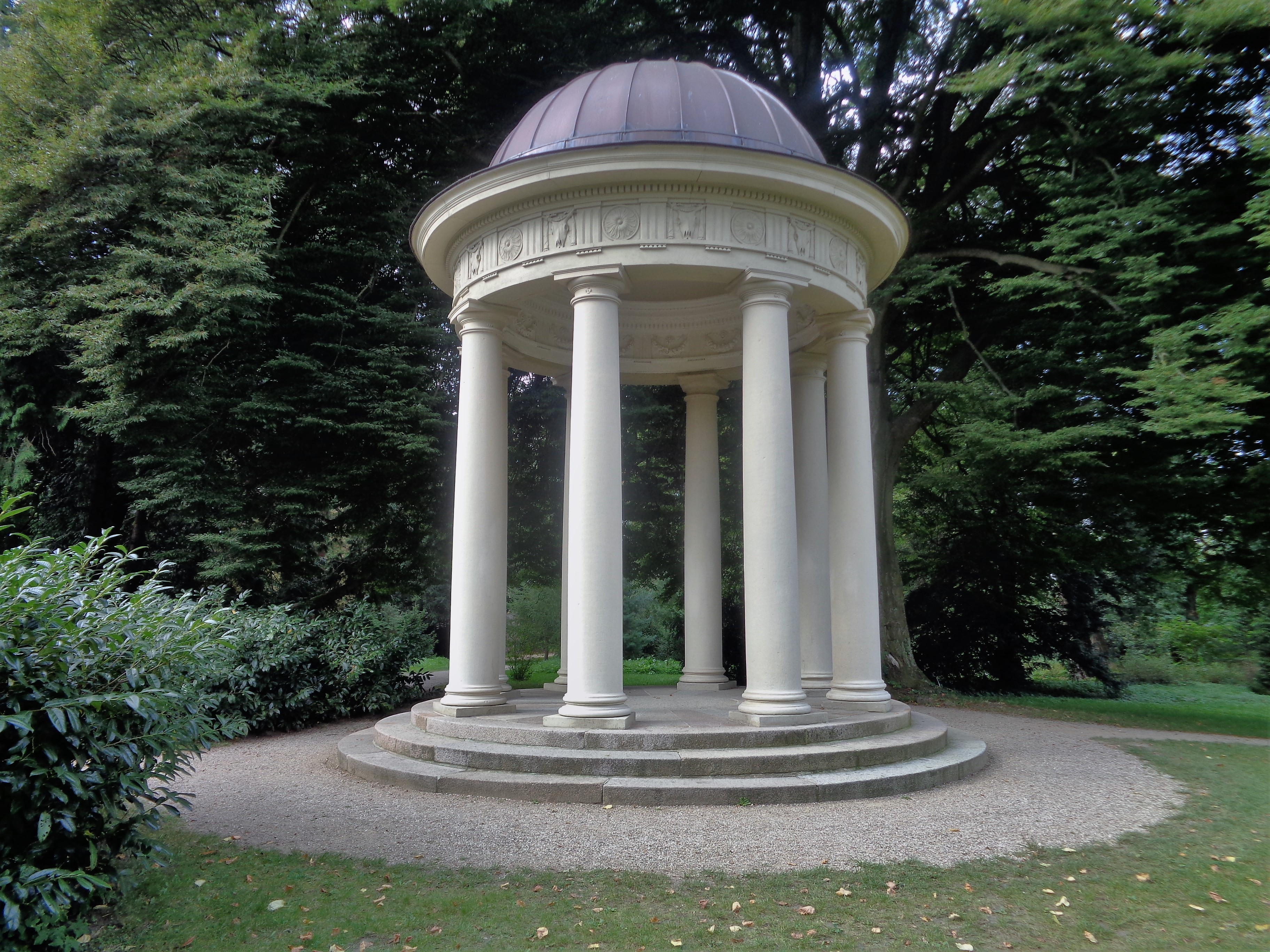 Der Monopteros oder "Sonnentempel" im Eutiner Schlossgarten. Christian Frederik Hansen (1756–1845) Alternative names C.F. Hansen; C. F. HansenDescription architect and university teacherDate of birth/death 29. Februar 1756 10. Juli 1845Location of birth/death Copenhagen CopenhagenAuthority control : Q678216 VIAF: 77107665 ISNI: 0000 0000 8396 1317 ULAN: 500017079 LCCN: n82164129 GND: 11854571X WorldCat creator QS:P170,Q678216